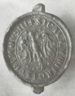 Ákos nb. (I.) Mojs királynéi tárnokmester pecsétje 1299-ből